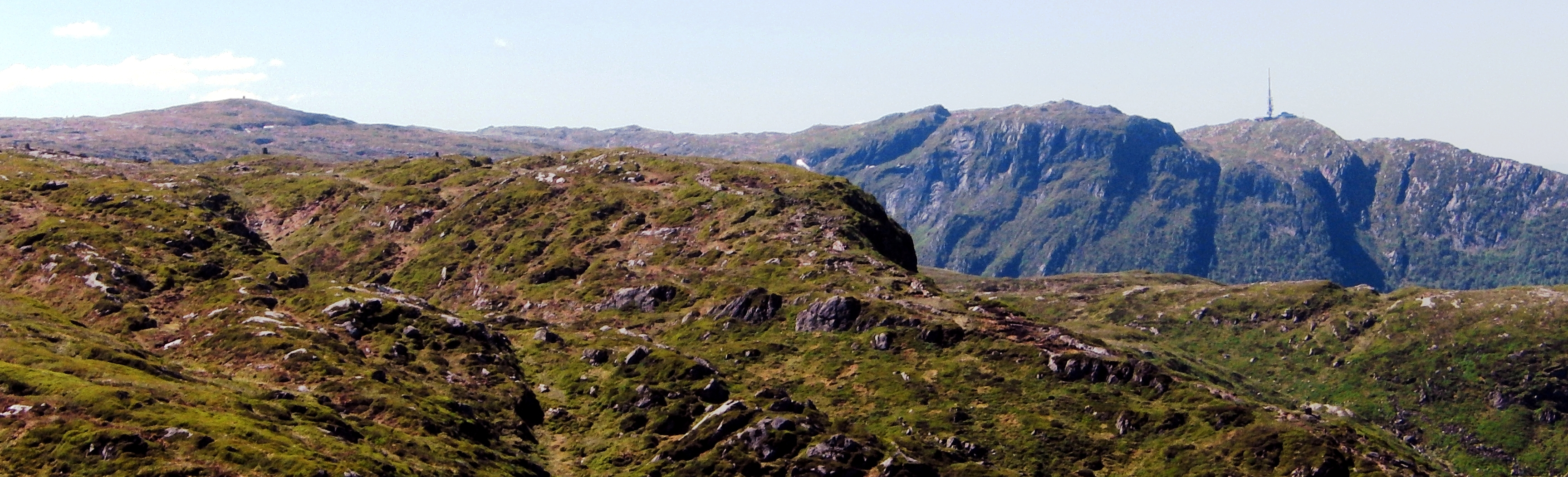 Description=Vidden